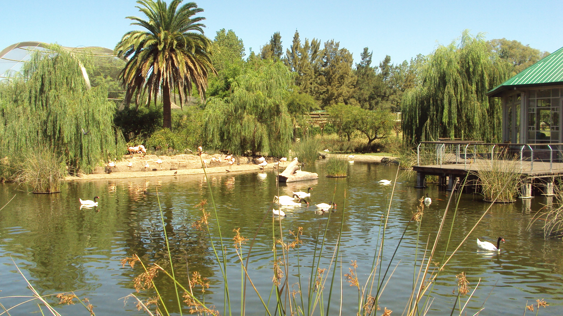 Parque Temaikén, en Buenos Aires.